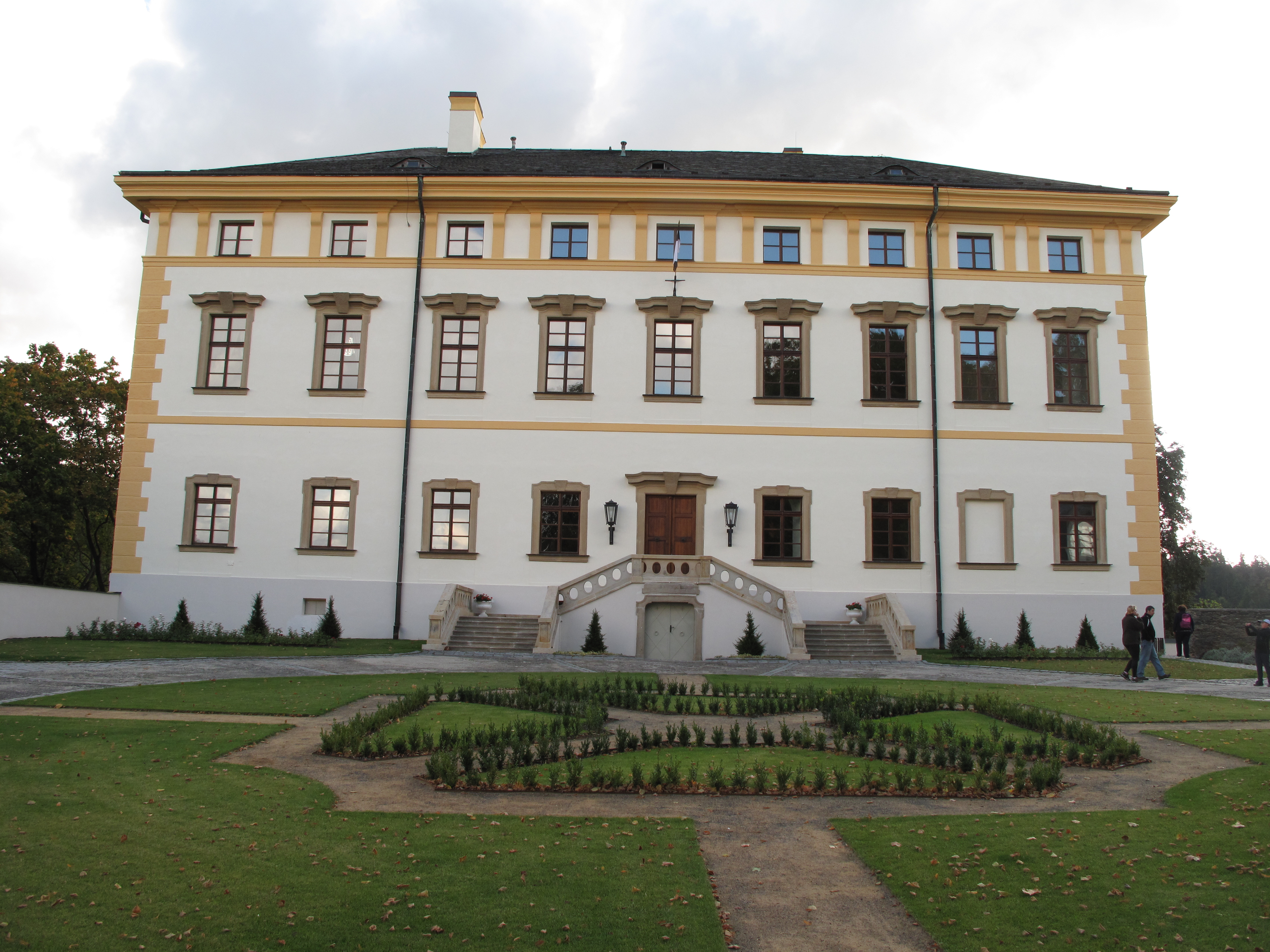 Pohled na rabštejnský zámek. Okres Plzeň-sever, Česká republika.